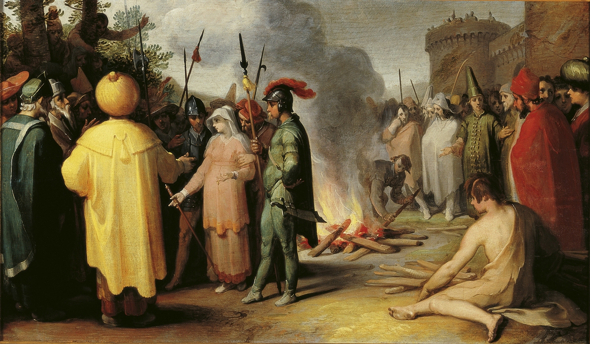 Judah and Tamar